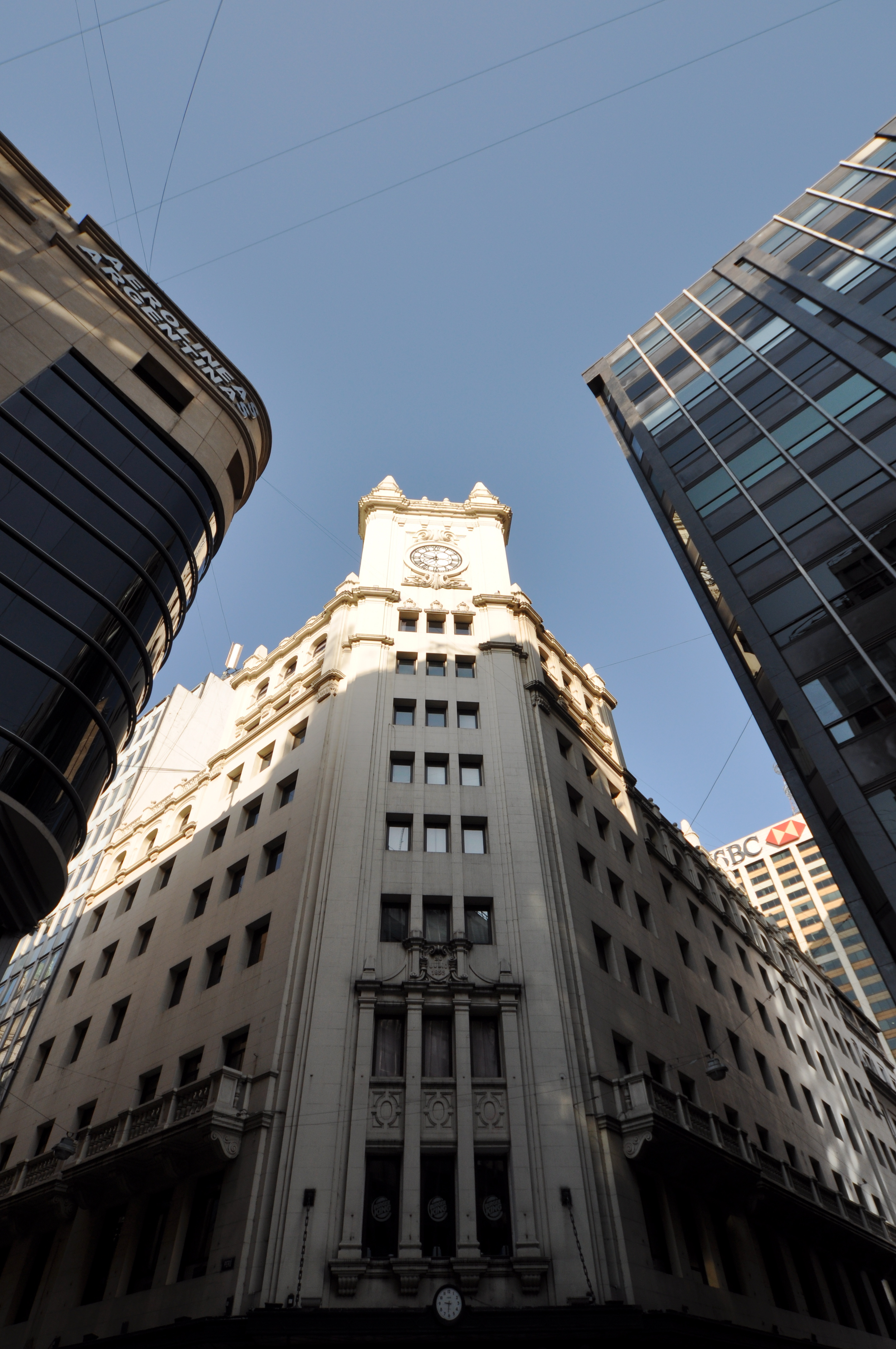 Florida and Rivadavia Streets, Buenos Aires.